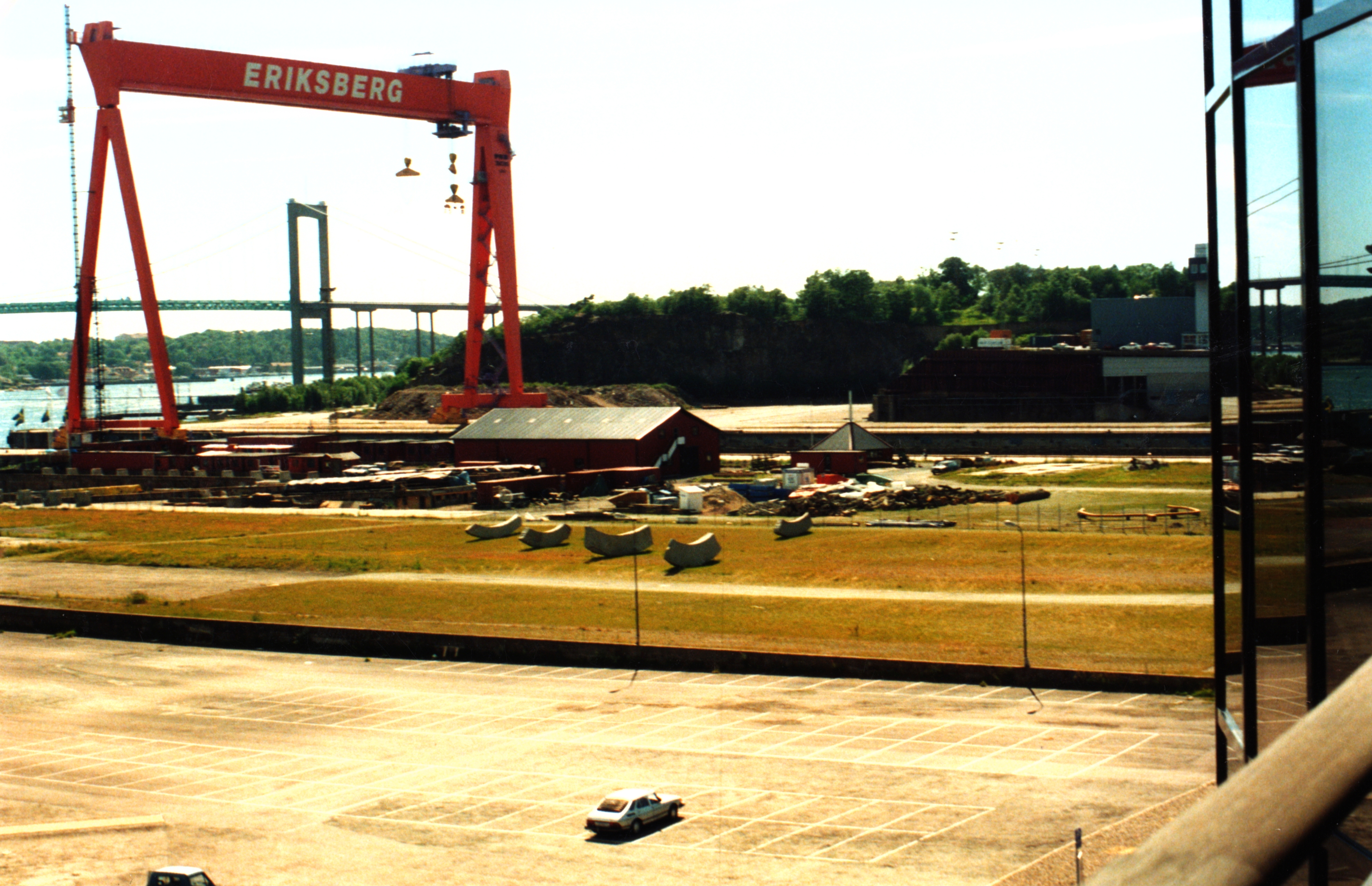 Eriksbergskranen (1990-talet)